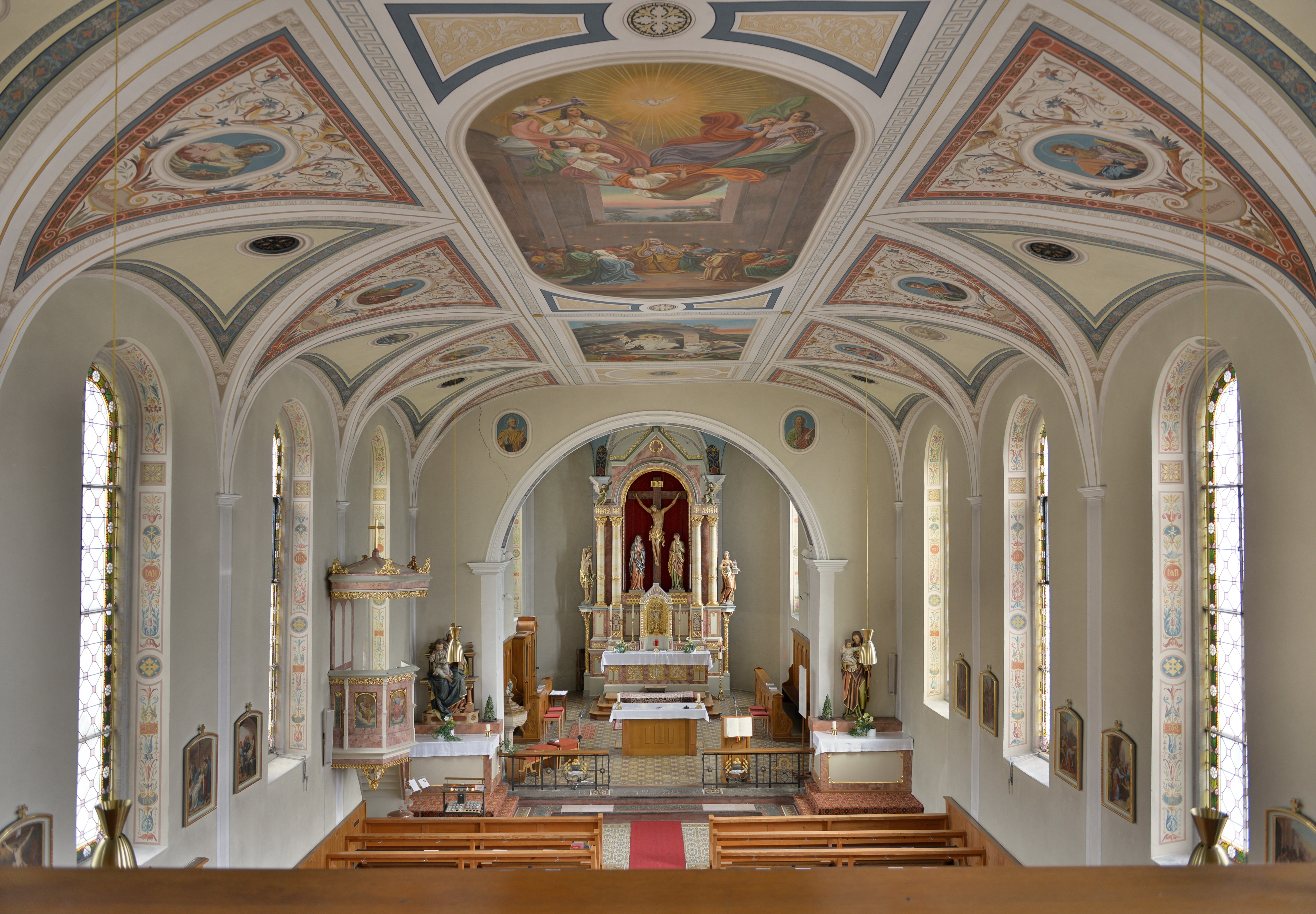 Pfarrkirche hl. Sebastian in Langen bei Bregenz in Vorarlberg.